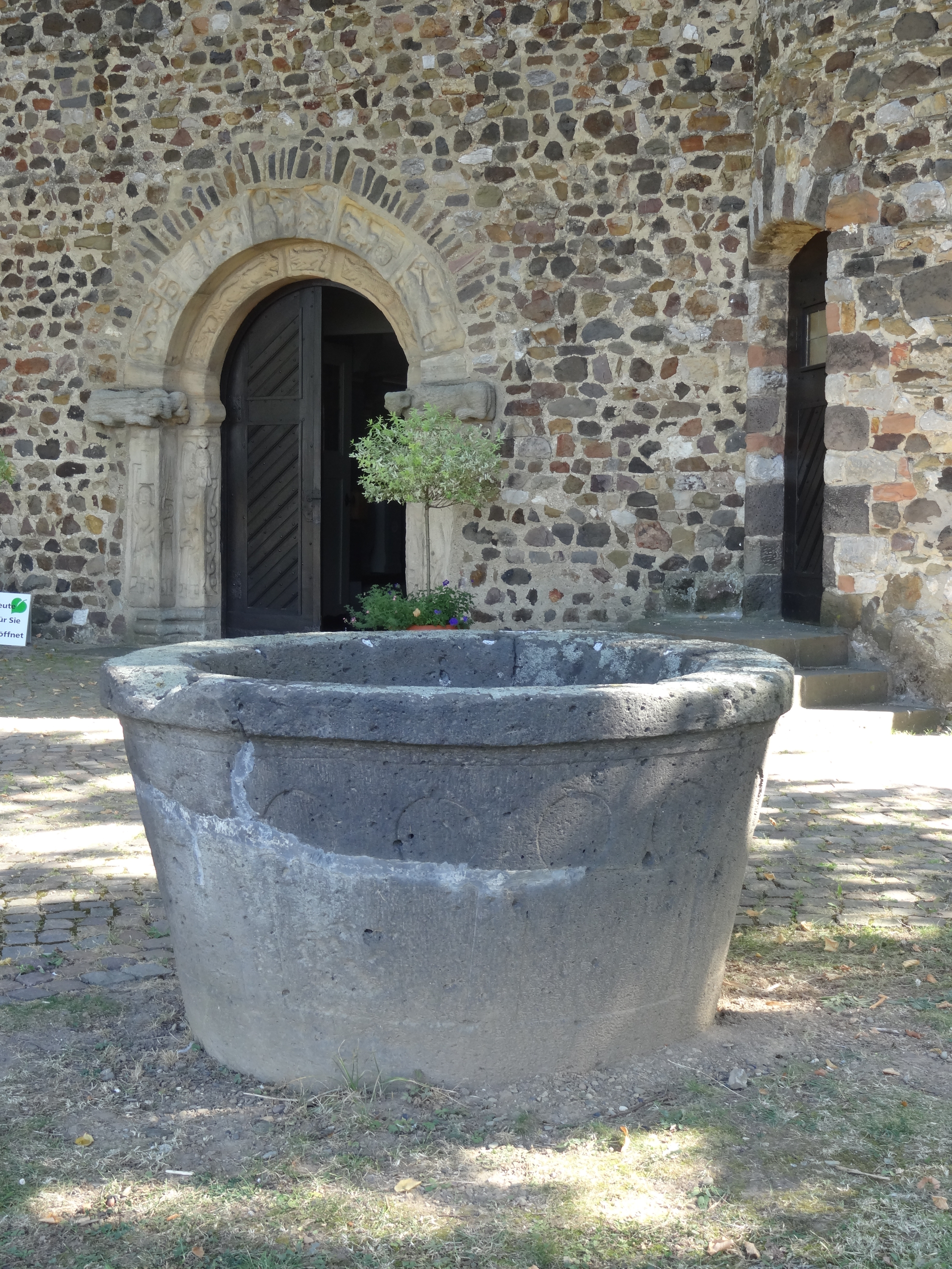 St. Peter (Großen-Linden)